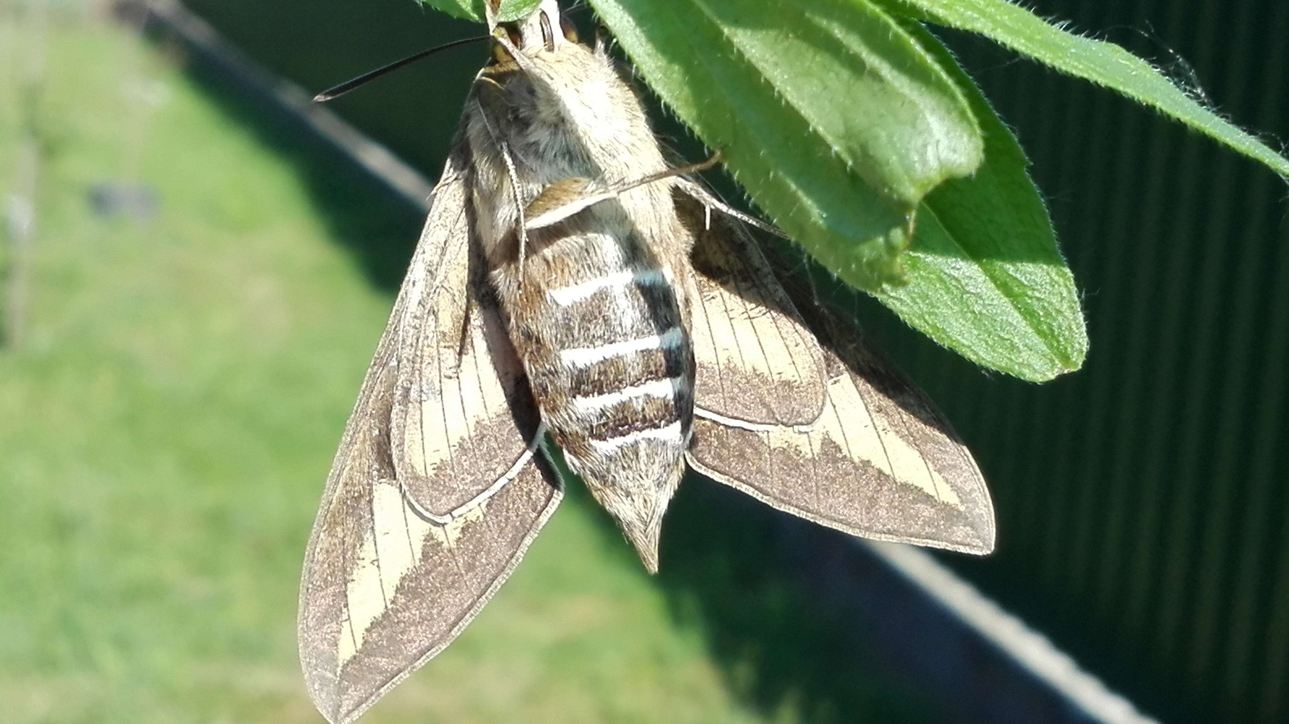 Hyles gallii